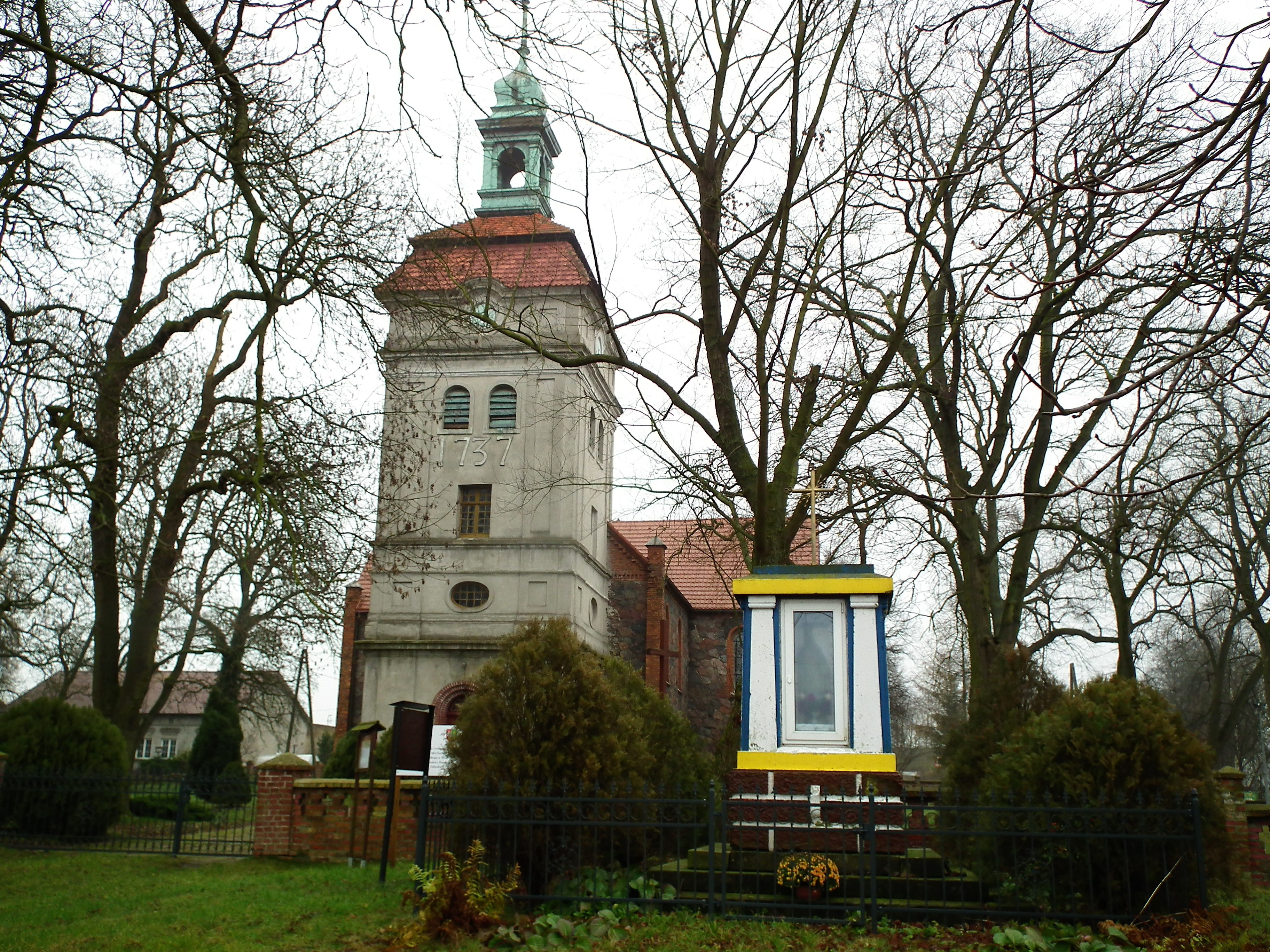 Kościół św. Wojciecha Biskupa w Mościcach koło Witnicy.